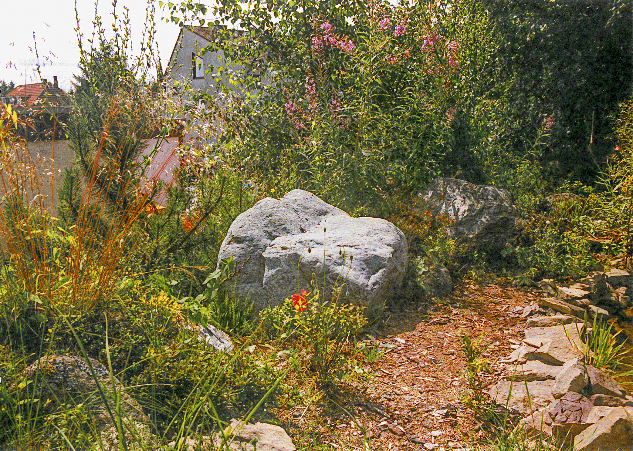 Wilder Garten in Wuppertal-Ronsdorf